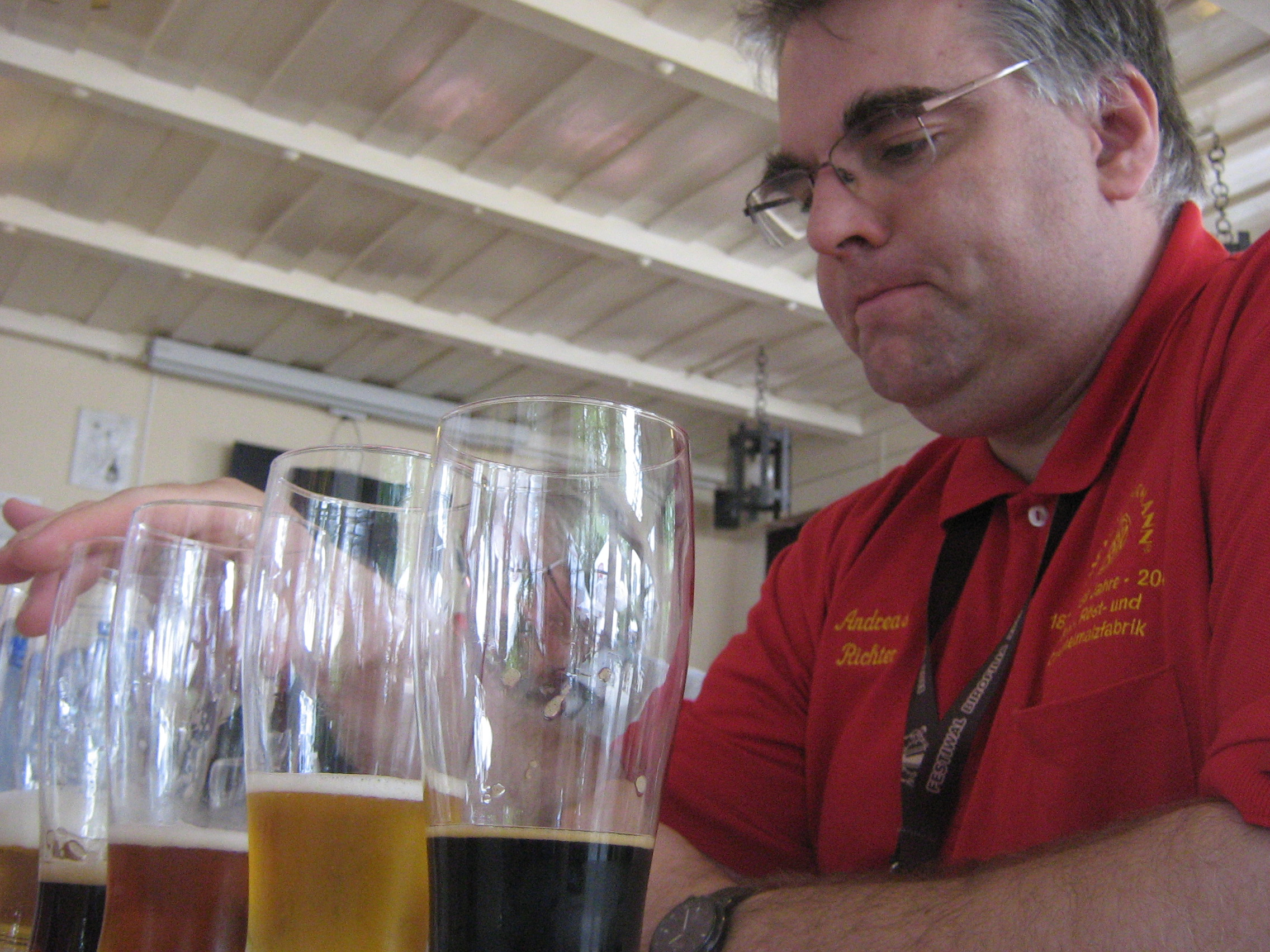 Andreas Richter ze słodowni Weyermann (Niemcy)